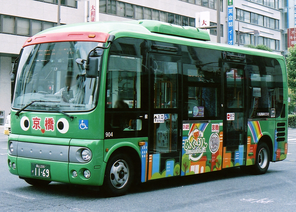 八晃運輸 岡山市中心部100円均一循環バス「京橋めぐりん」日野・ポンチョ SKG-HX9JLBE